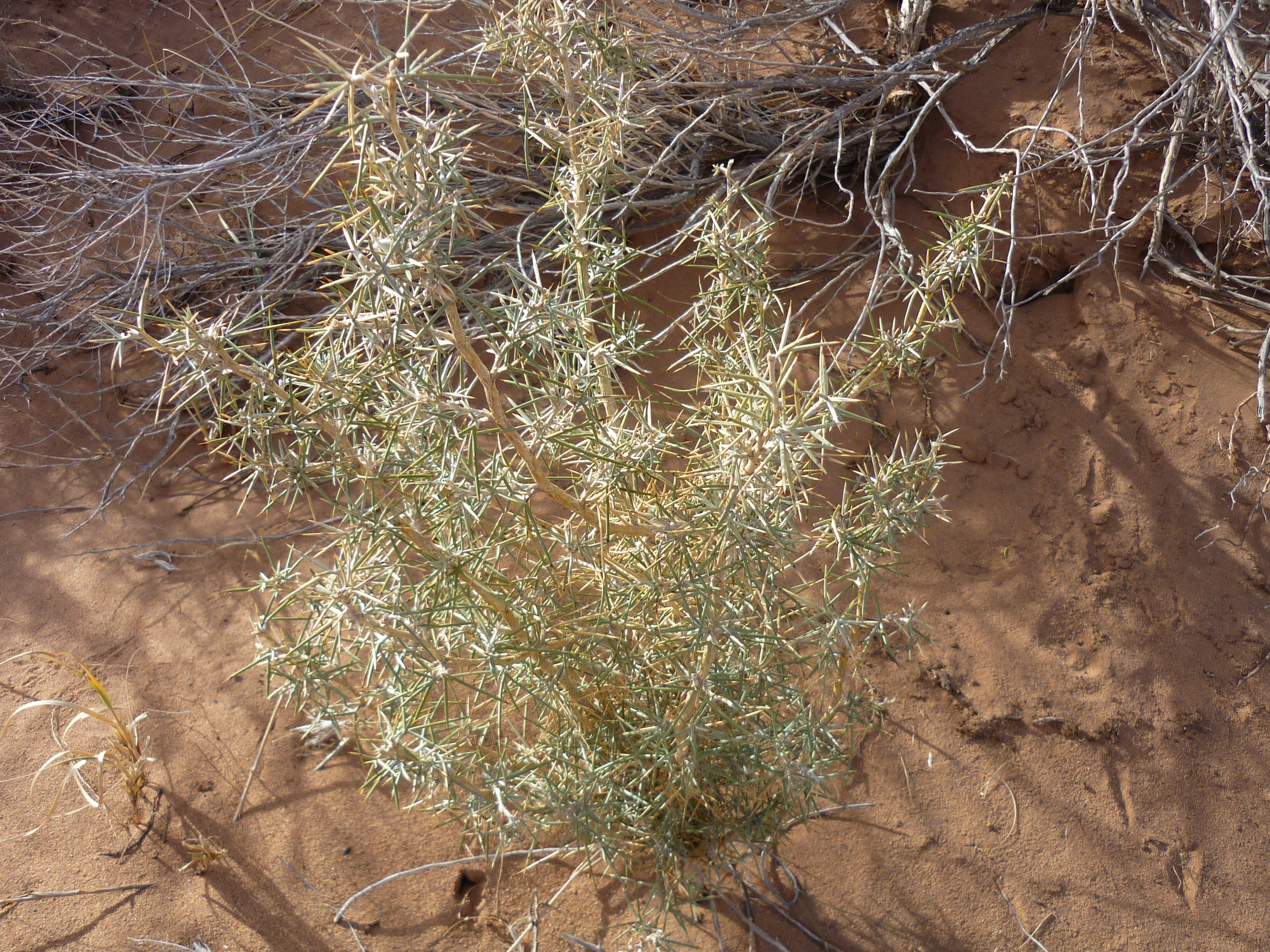 Anarthrophyllum macrophyllum